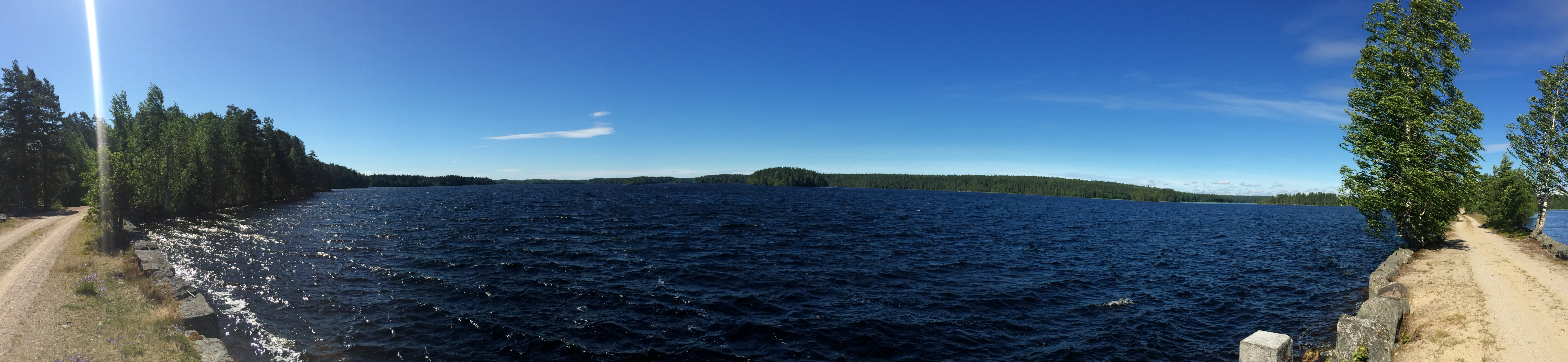 Толвоярви